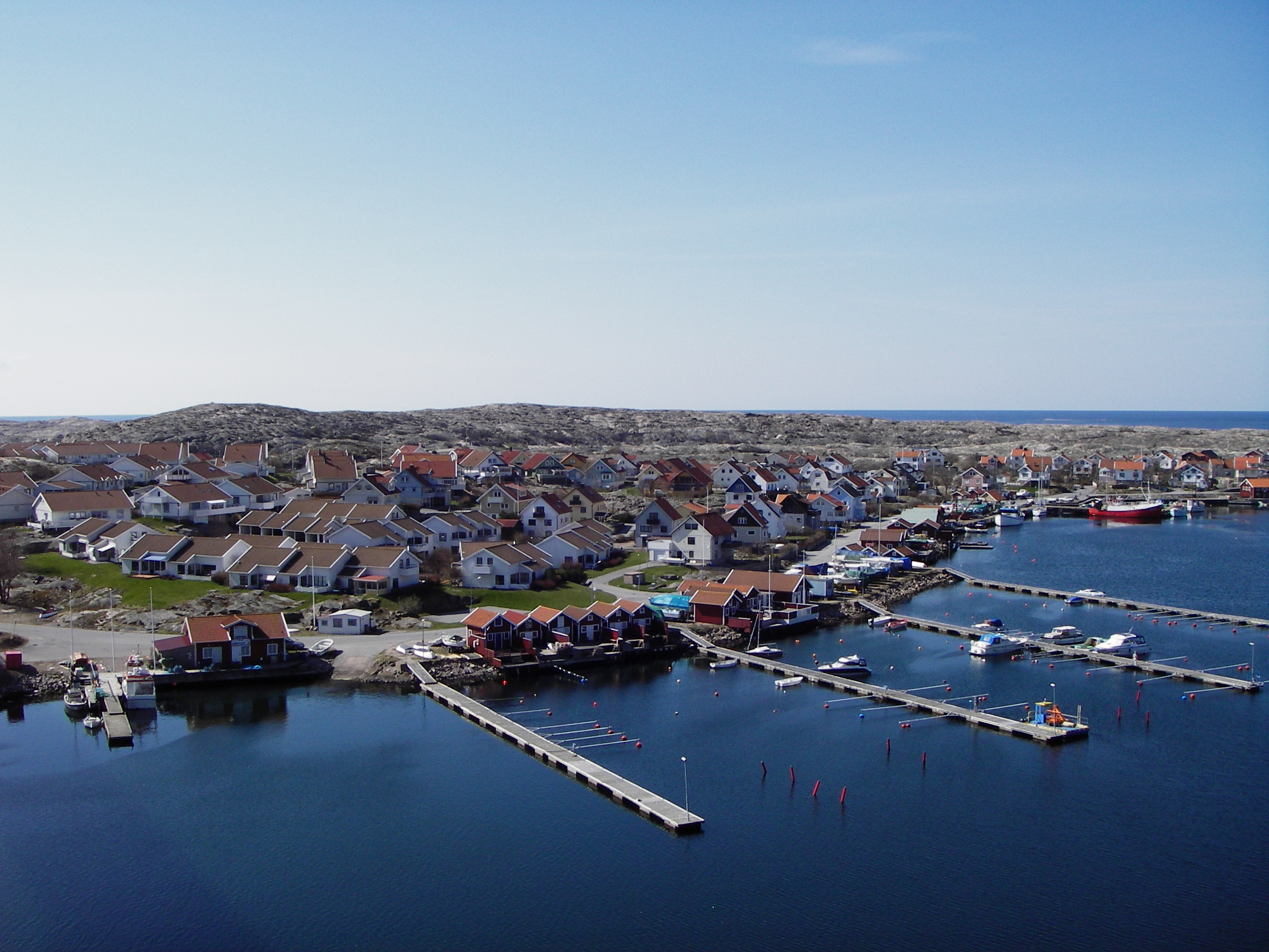 Hasselösund from smögen bridge